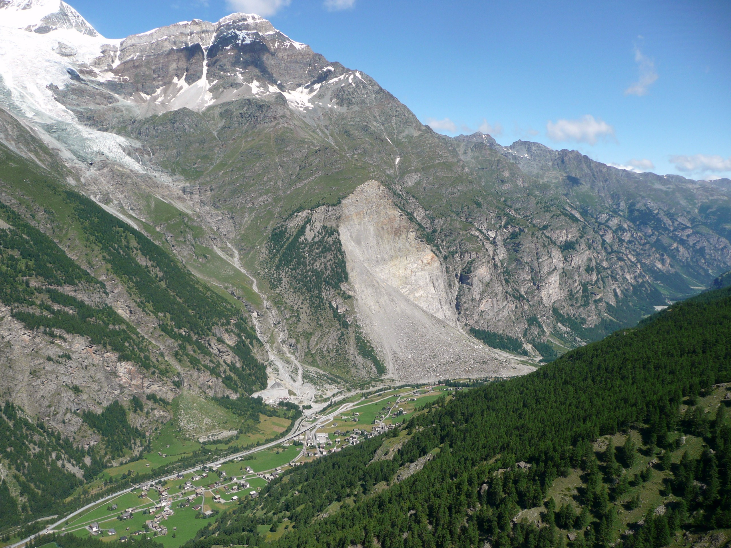 Bergsturz von Randa, aufgenommen vom Europaweg